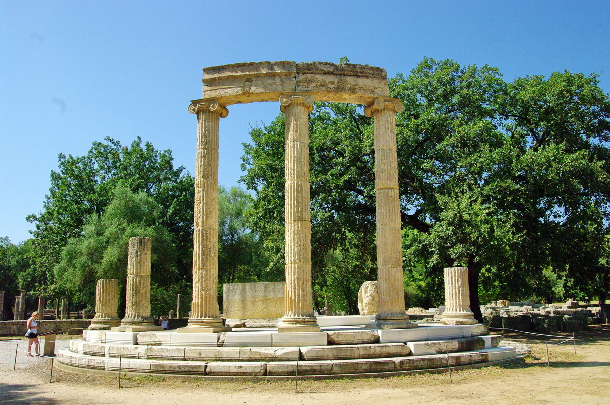 Olympia: Philippeion